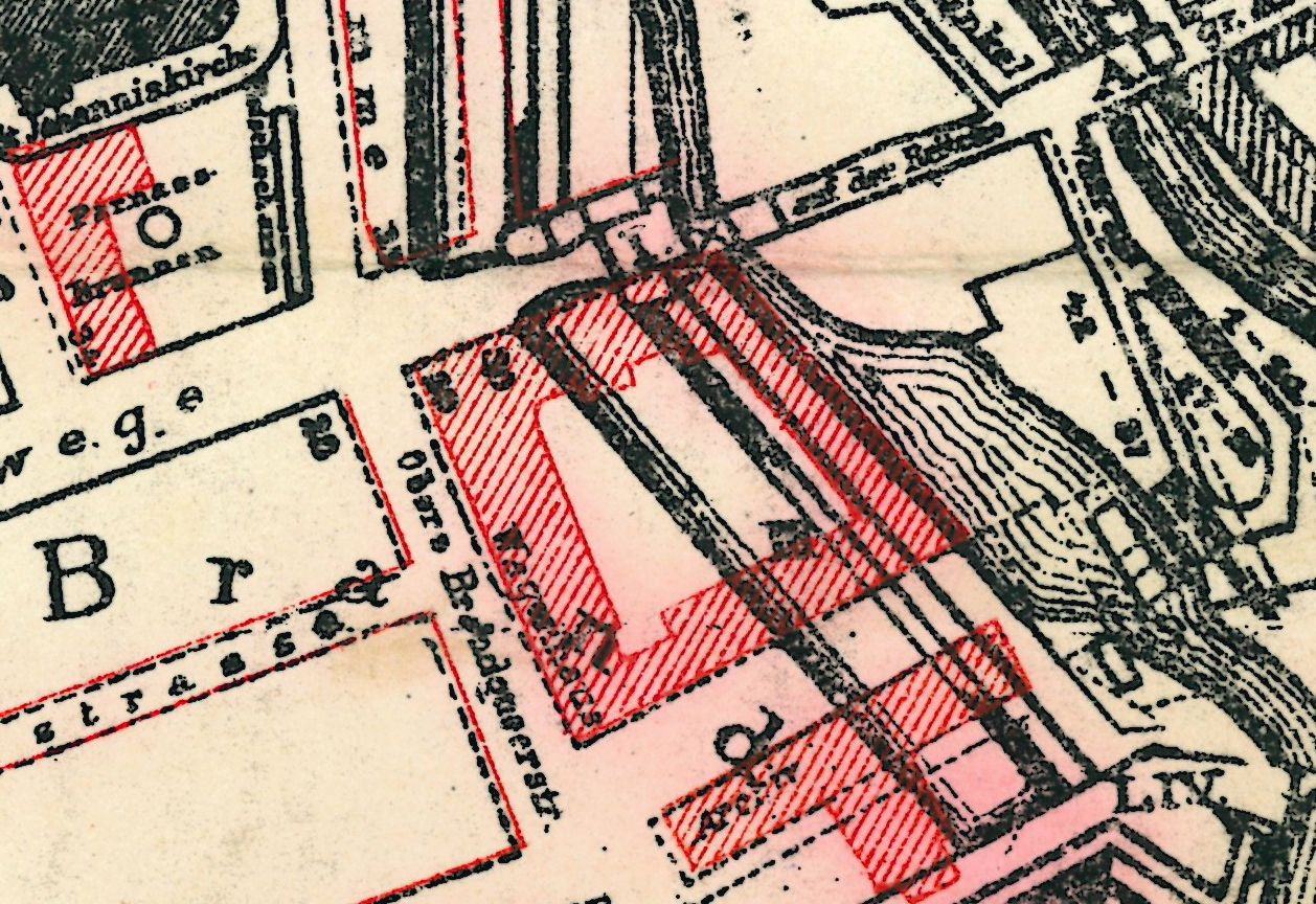 Errichtung des Regierungsgebäudes in Hannover an der heutigen Calenberger Straße: Ausschnitt aus Stadtplan Hannover (s. Plan der Stadt Hannover) mit den historischen Straßenzügen der Altstadt einerseits, den im 17. Jahrhundert entstandenen Befestigungs-Anlagen Hannovers inklusive der Calenberger Neustadt sowie den im Zuge der Industrialisierung bis um das Jahr 1900 neu angelegten Straßen. Dieser mit 600 dpi bei Wikipedia Hannover eingescannte Ausschnitt eines originalen Druckes im Format größer als DIN A3 ist ein vermutlich noch unfertiger und mit seiner Legende noch fehlerhafter Zweifarben-Druck, möglicherweise aus der Feder des Archivars und Historikers Karl Friedrich Leonhardt.Links oben die Neustädter Hof- und Stadtkirche St. Johannis., südlich das Staatsarchiv Hannover. Direkt am Regierungsgebäude entlang floss ein Leine-Arm.Das Regierungsgebäude beherbergt seit 1986 das im selben Jahr gebildete Niedersächsische Umweltministerium.